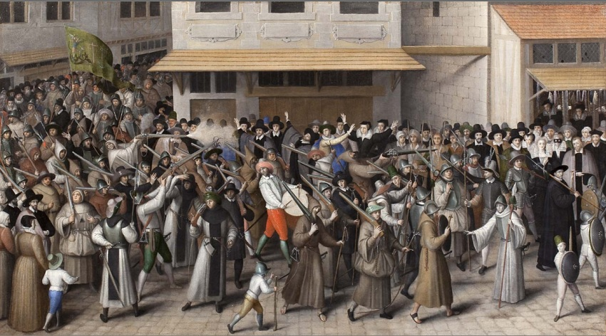 François II Bunel dit le Jeune, Procession de la Ligue